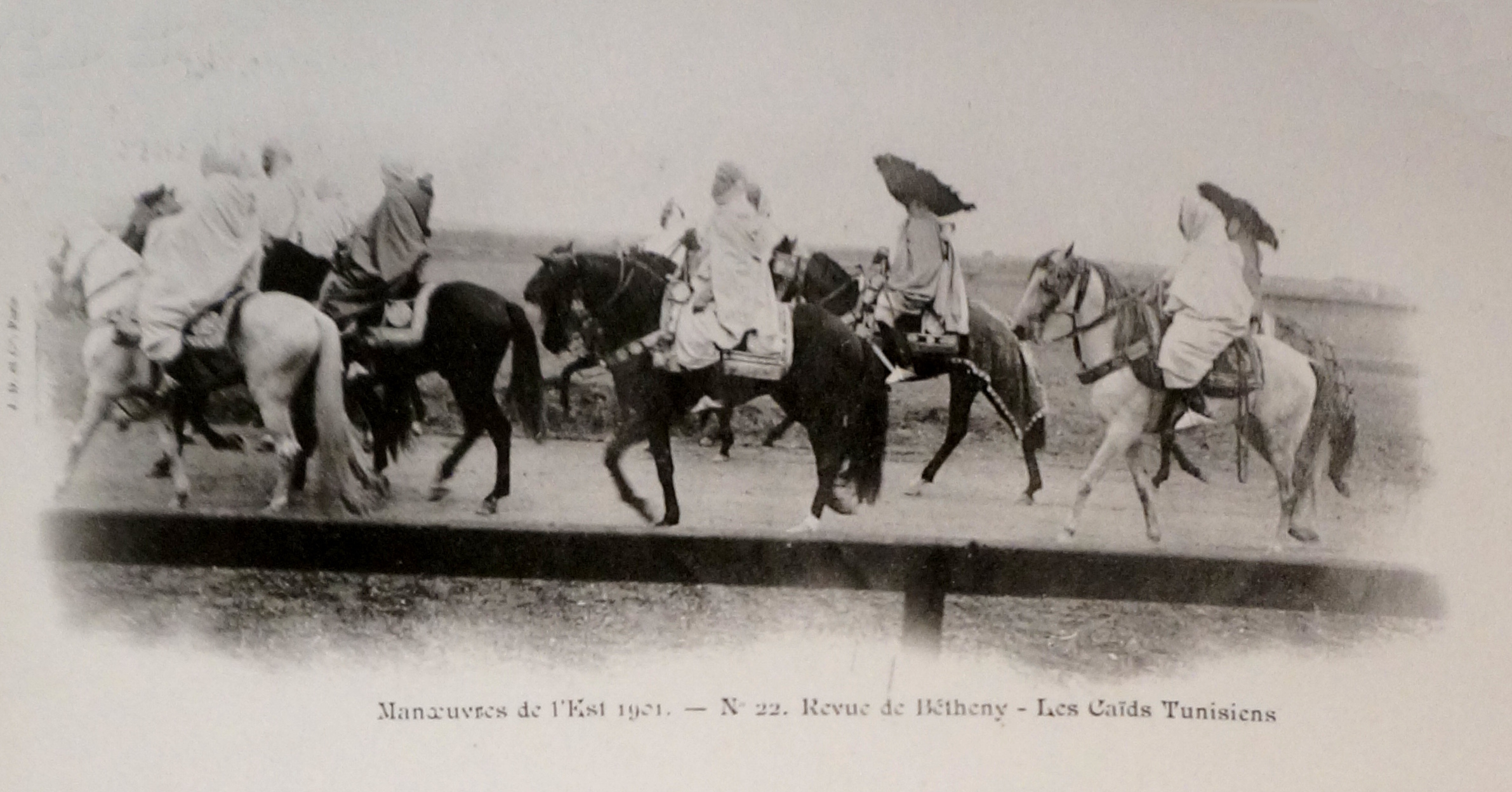 Lors des Grandes manoeuvrves de l'est de 1901, cartes posatles de 1901 de la BM de Reims sous la cote CPA t4.